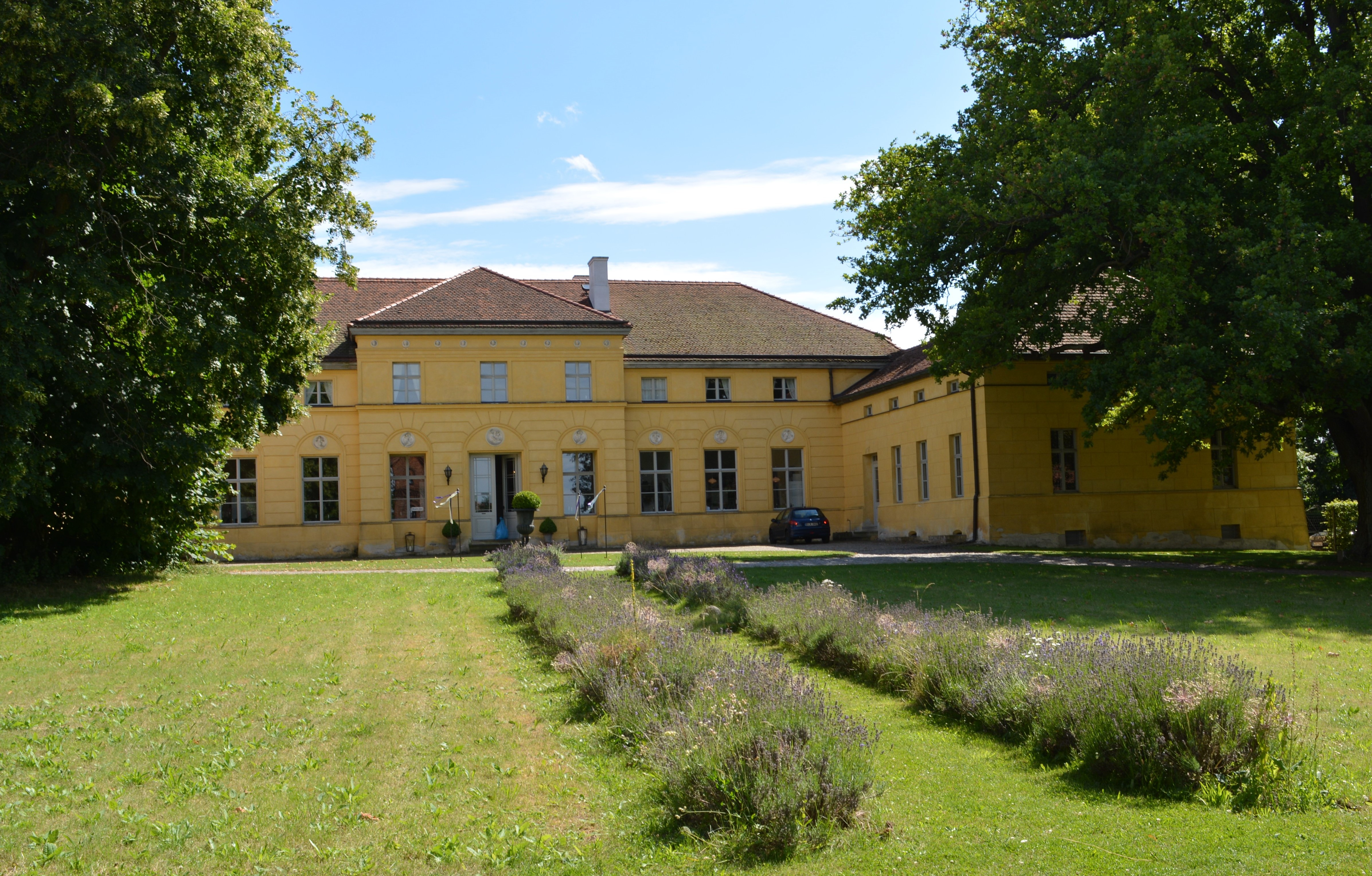 Denkmalgeschütztes Herrenhaus des Adelsgeschlechtes von Bredow in Kleßen, Landkreis Havelland